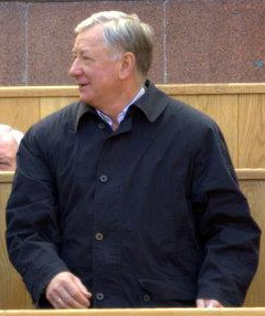 Boris Ignatiev